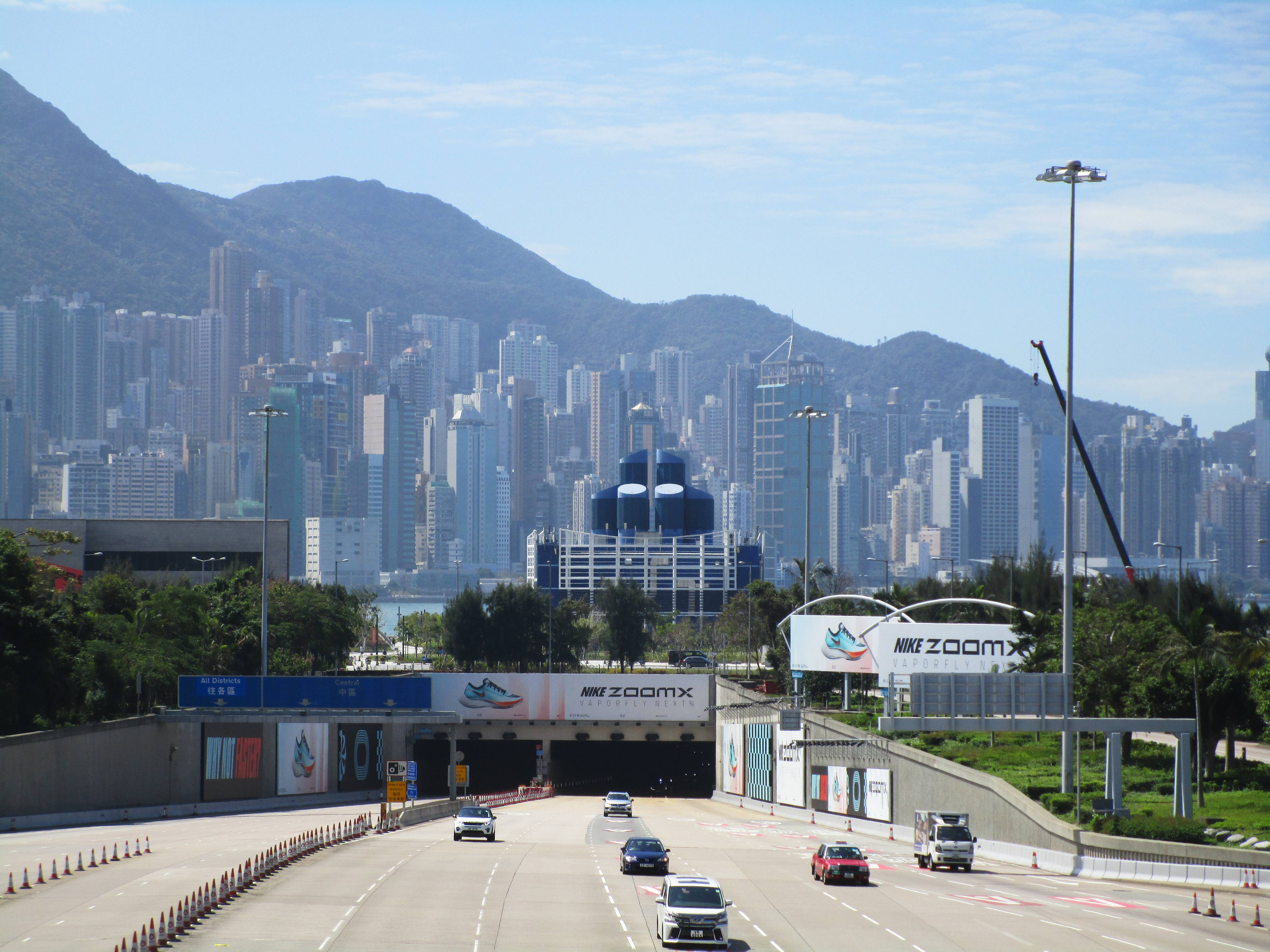 中文（香港）: 西區海底隧道九龍入口。